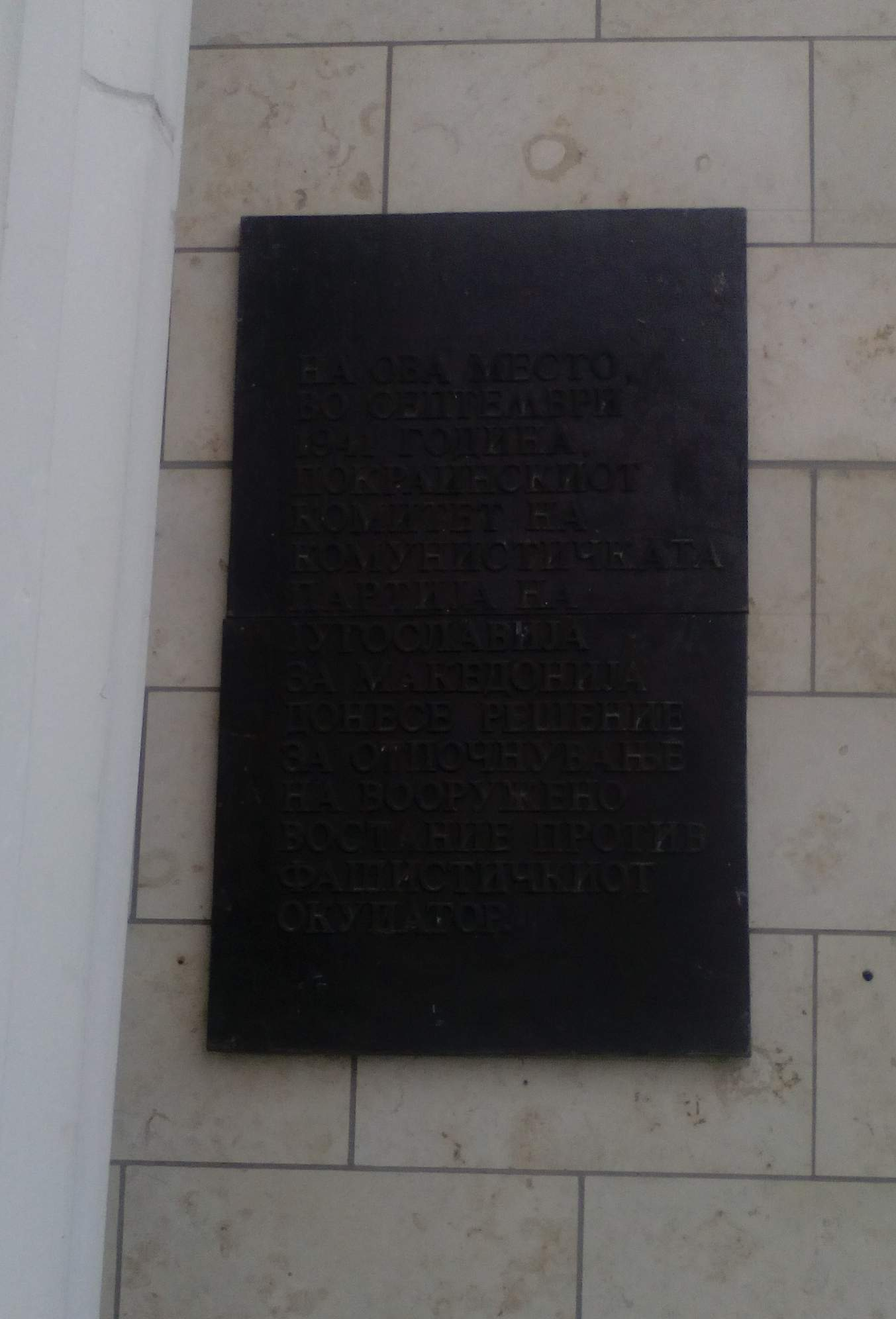 Спомен плоча на локацијата каде ПК КПЈ за Македонија донесе одлука за отпочнување на востание на 11 октомври 1941